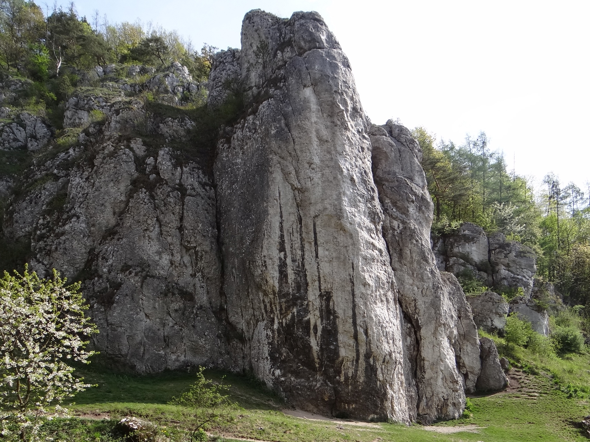 Filar Abazego w Dolinie Bolechowickiej